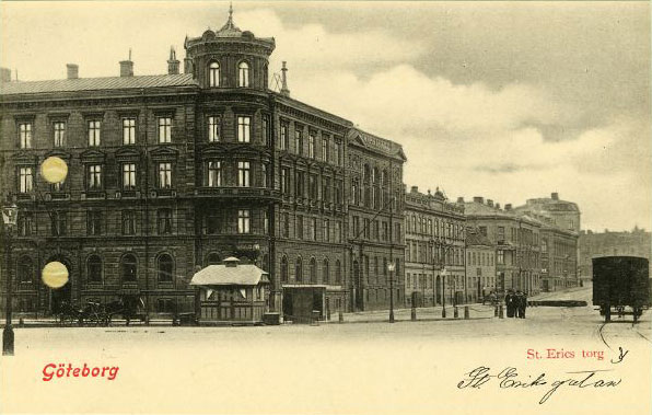 Picture postcard. Hasselbladshuset, S:t Eriks torg, Göteborg